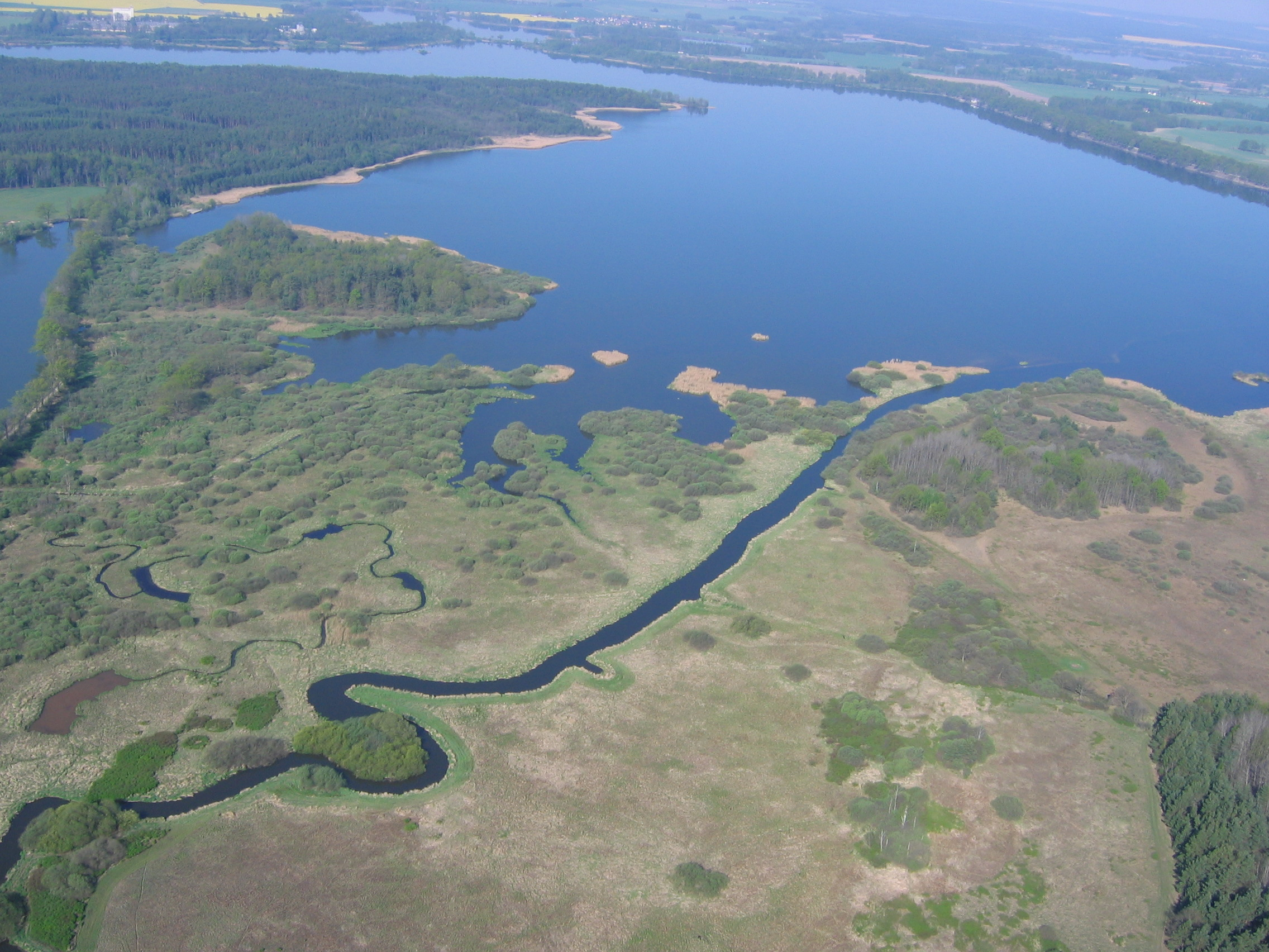 Rybník - Rožmberská rybniční soustava (Třeboň), Třeboň